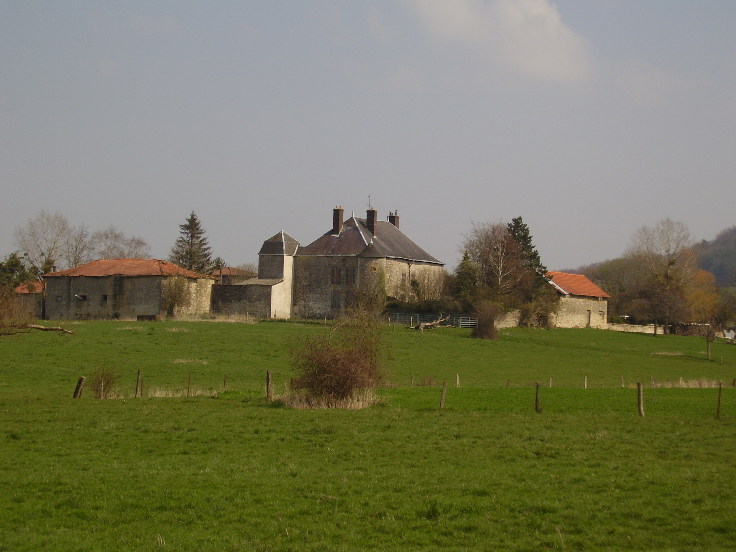 Chateau de Lion-devant-Dun (Meuse) ,en 2007